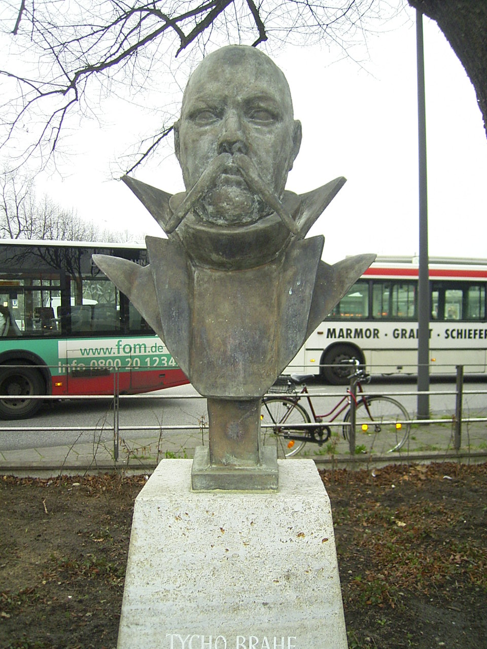 Büste Tycho Brahes am Markt in Wandsbek